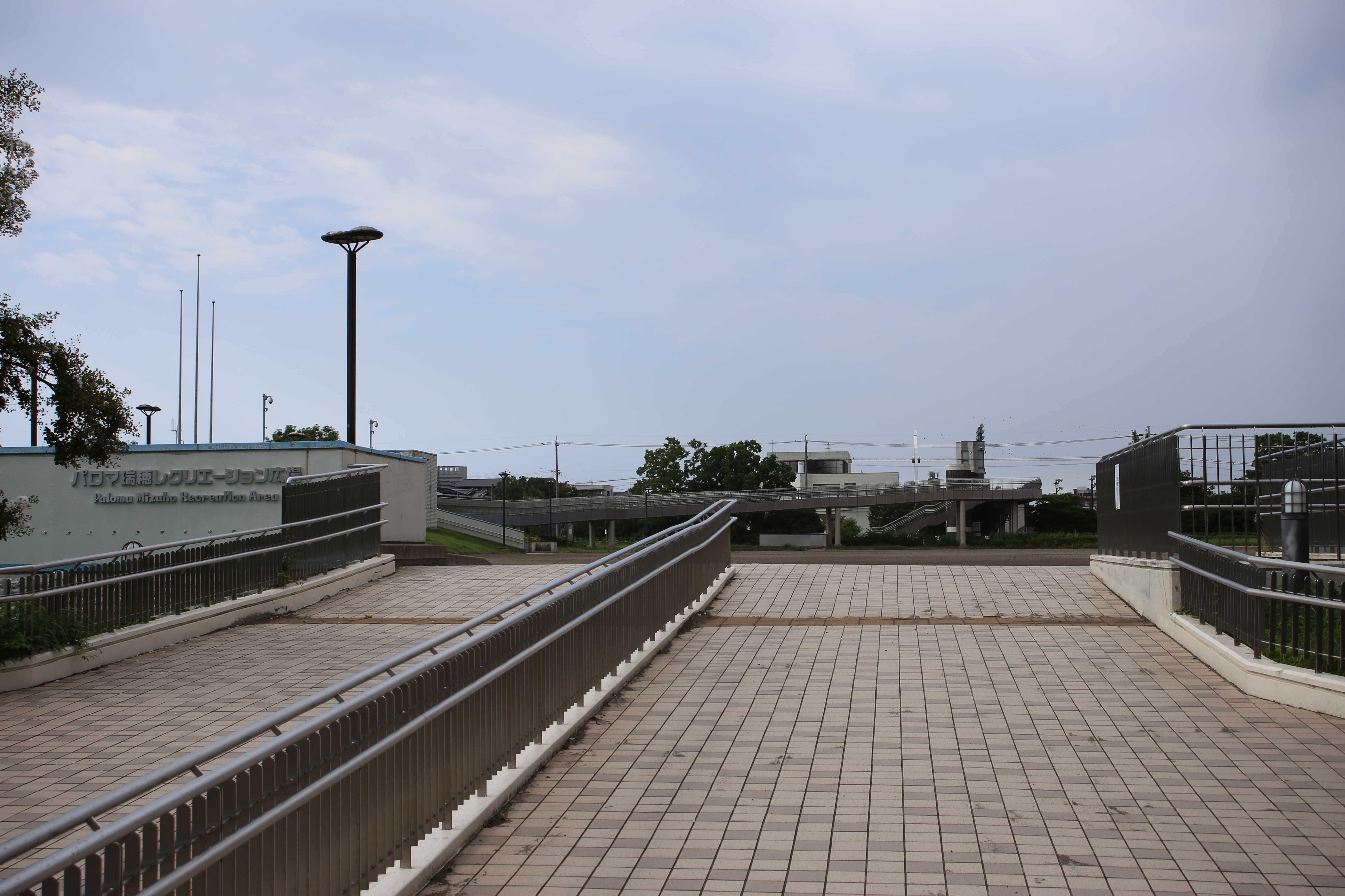 瑞穂公園レクリエーション広場